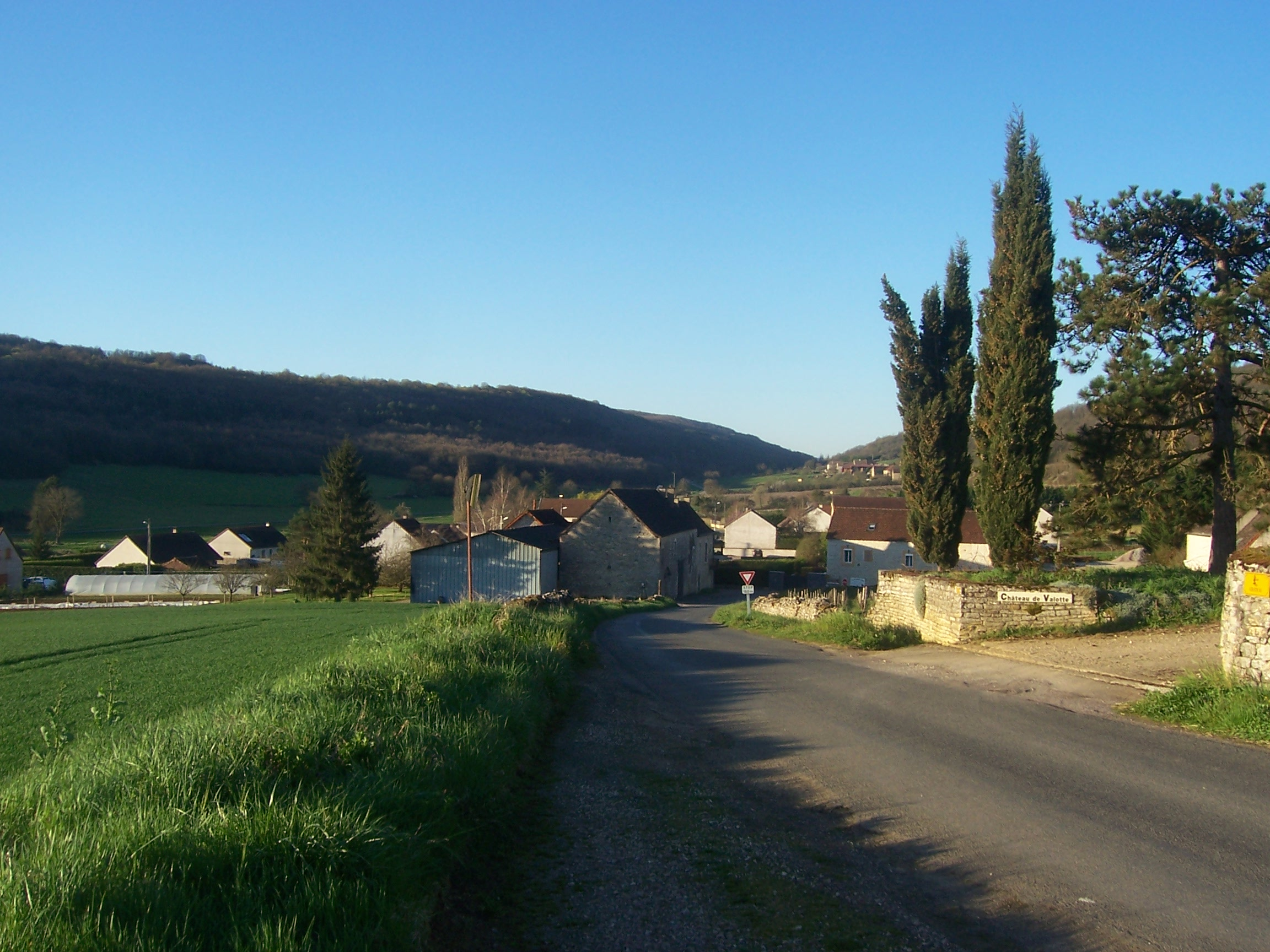 Valotte